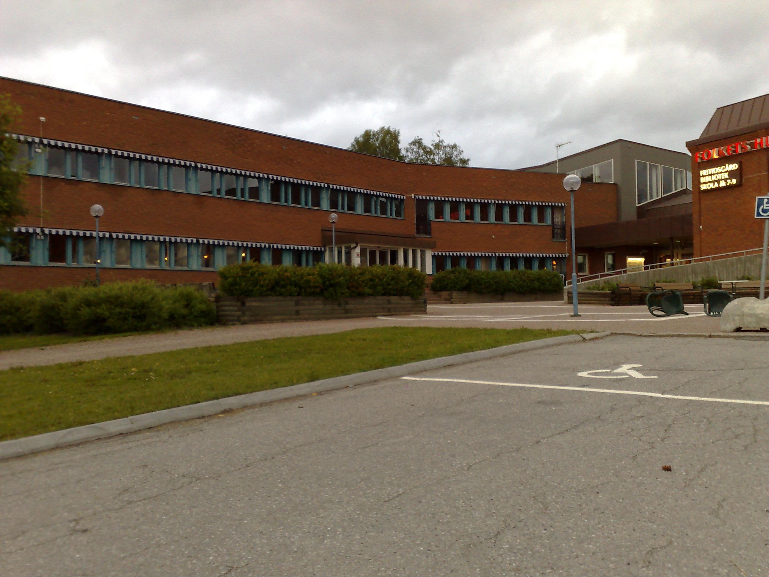 Bräcke kommunhus